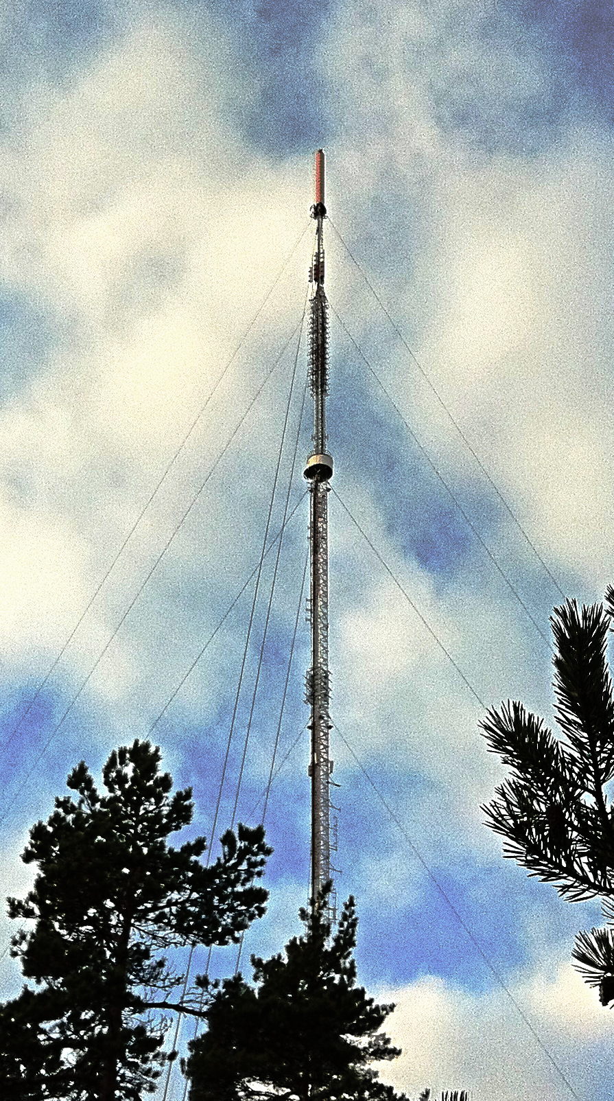 Lapuan radio- ja televisiomasto